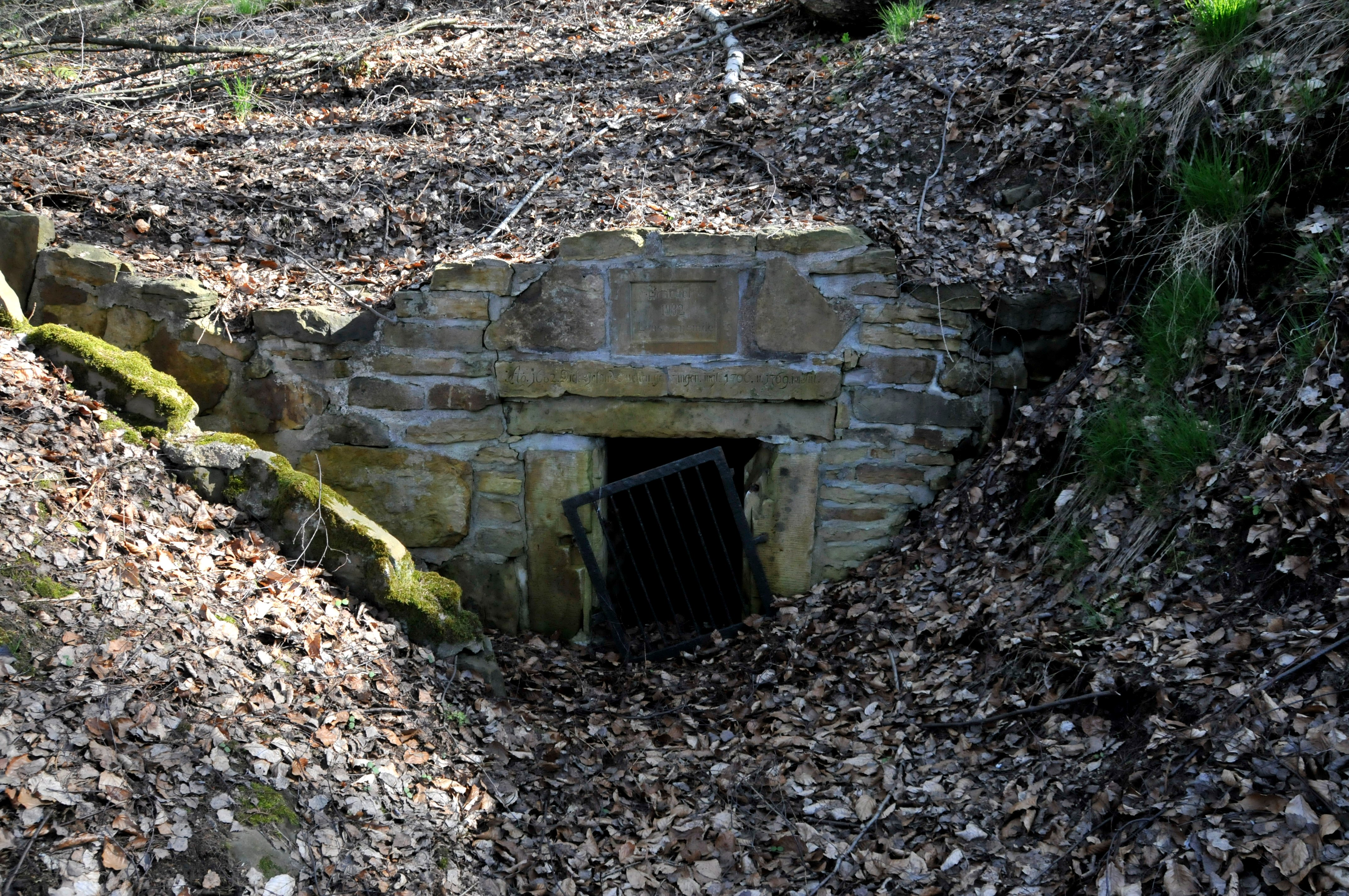 Der Gesundbrunnen am Seeberg (Gotha)